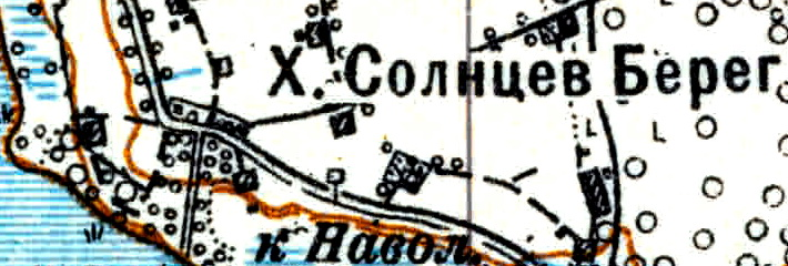 Топографическая карта Ленинградской области, квадрат Vc-29 (Батецкая), деревня Солнцев Берег